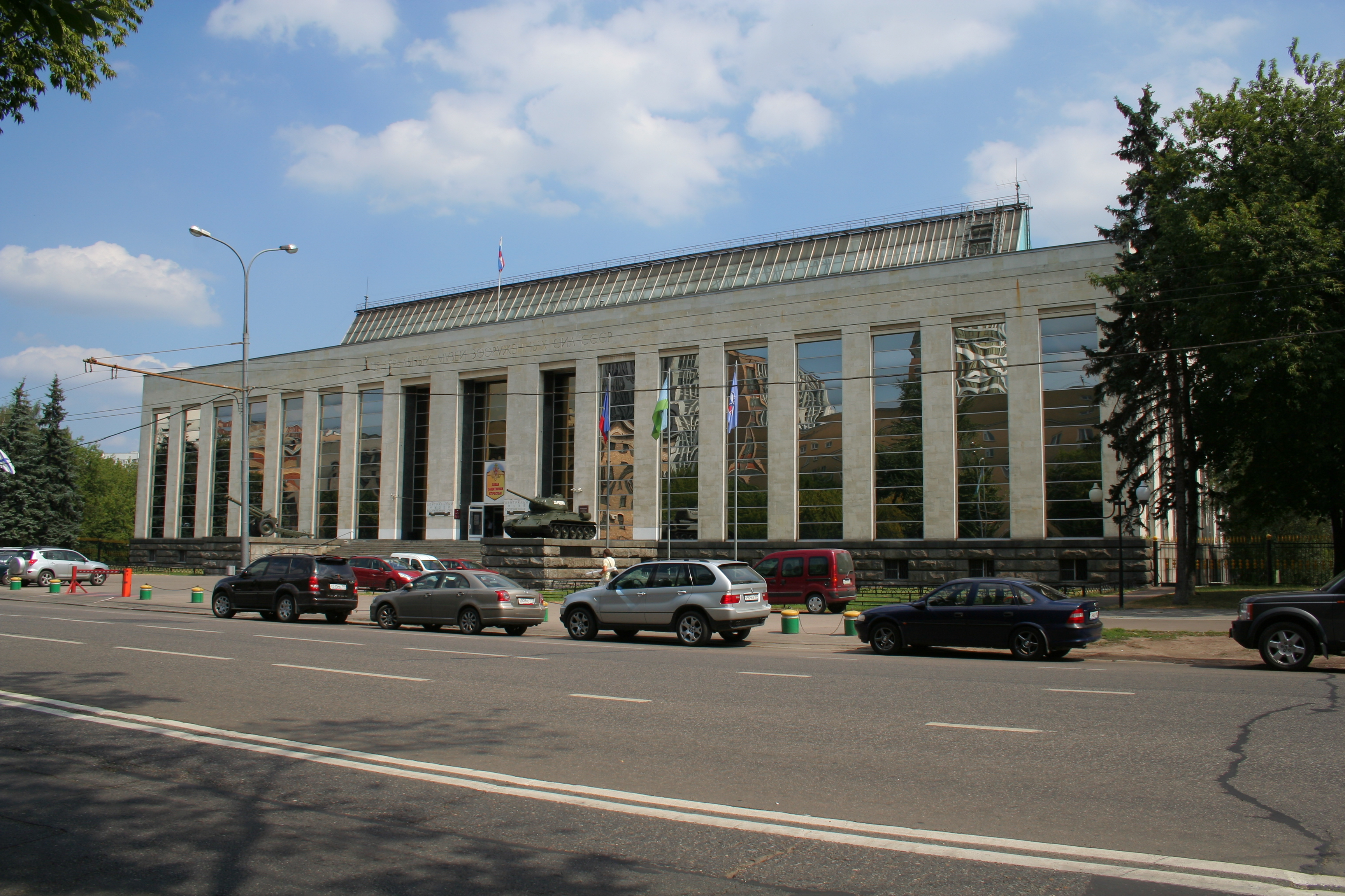 Zentralmuseum der Russischen Streitkräfte in Moskau.